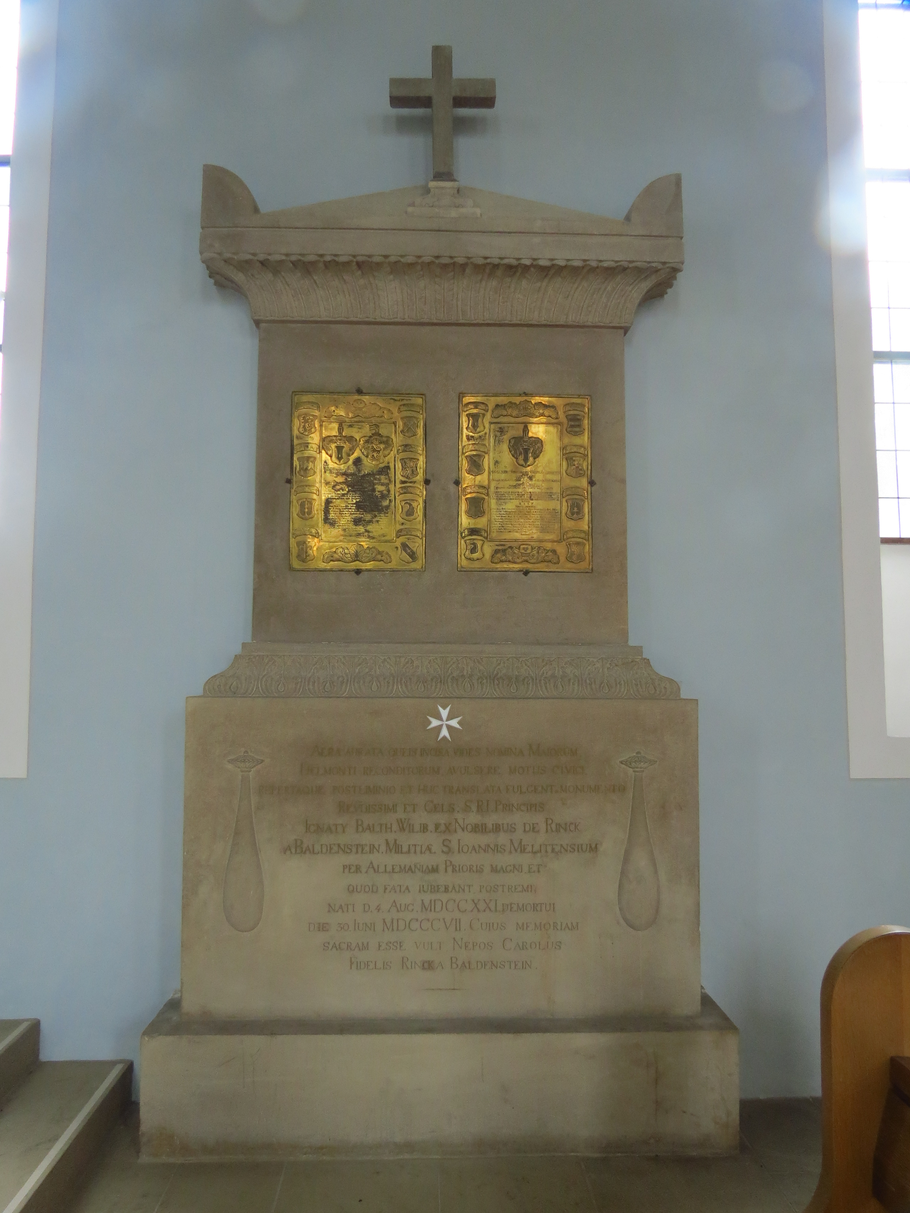 Grabmal des Johannitergroßpriors Ignaz Balthasar Rinck von Baldensteinin der Bartholomäus-Kirche in Heitersheim, Landkreis Breisgau-Hochschwarzwald, Baden-Württemberg